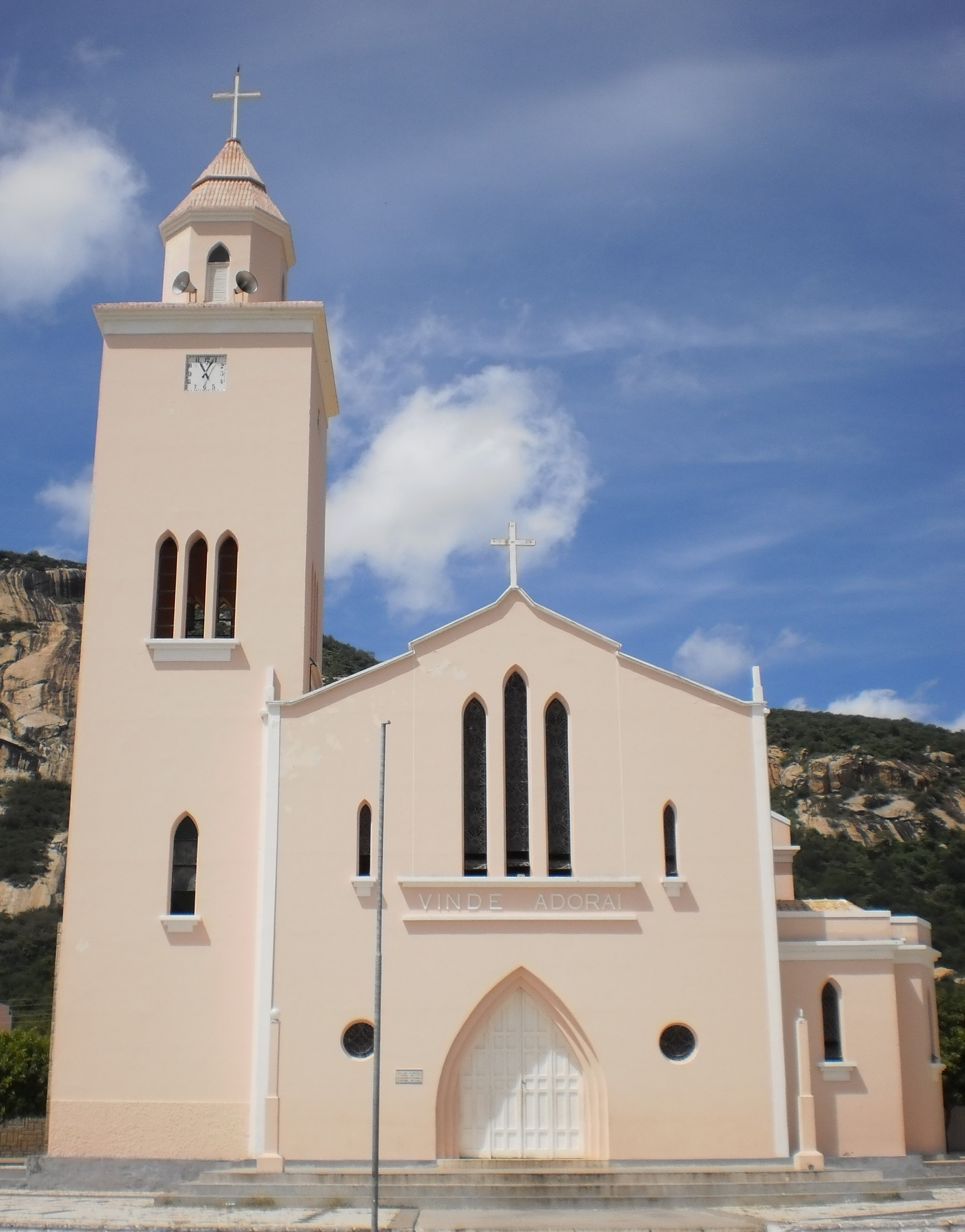 Igreja Católica localizada no município de Patu, no estado do Rio Grande do Norte, Brasil.